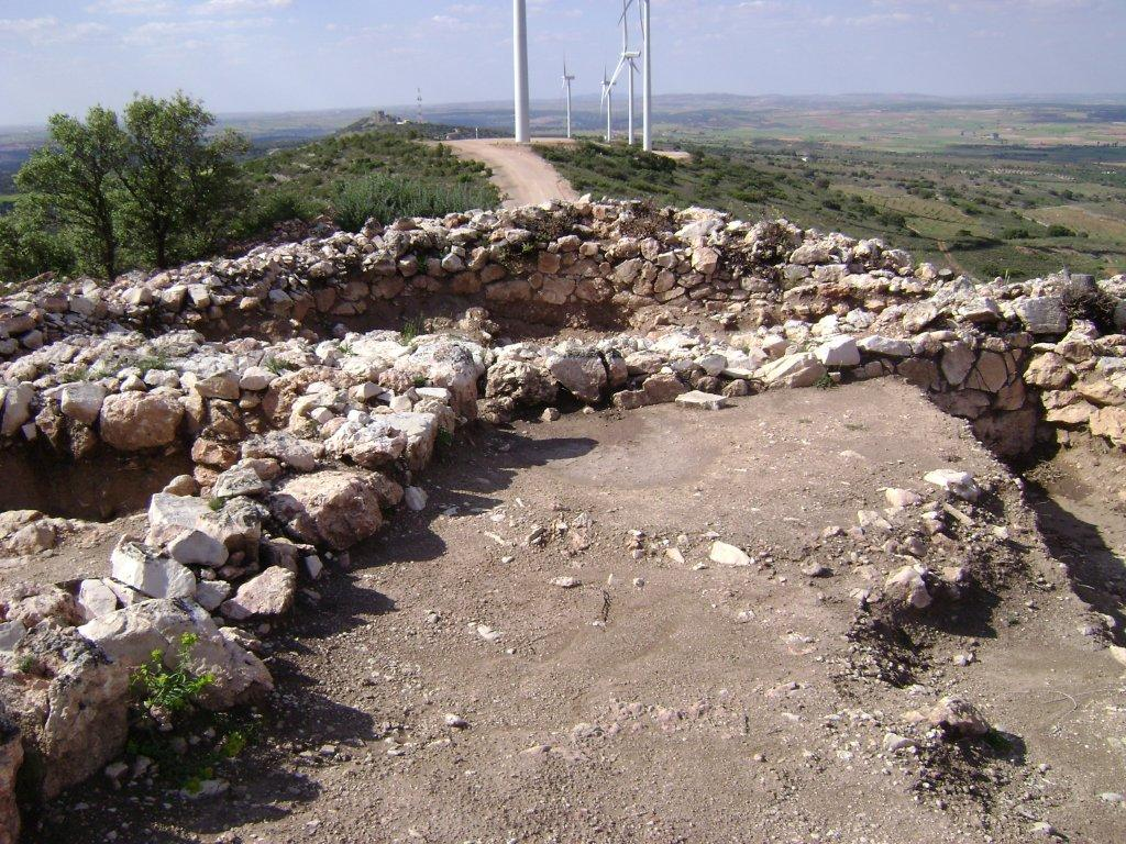 Castro celtibérico a los pies del parque eólico de Puebla de Almenara